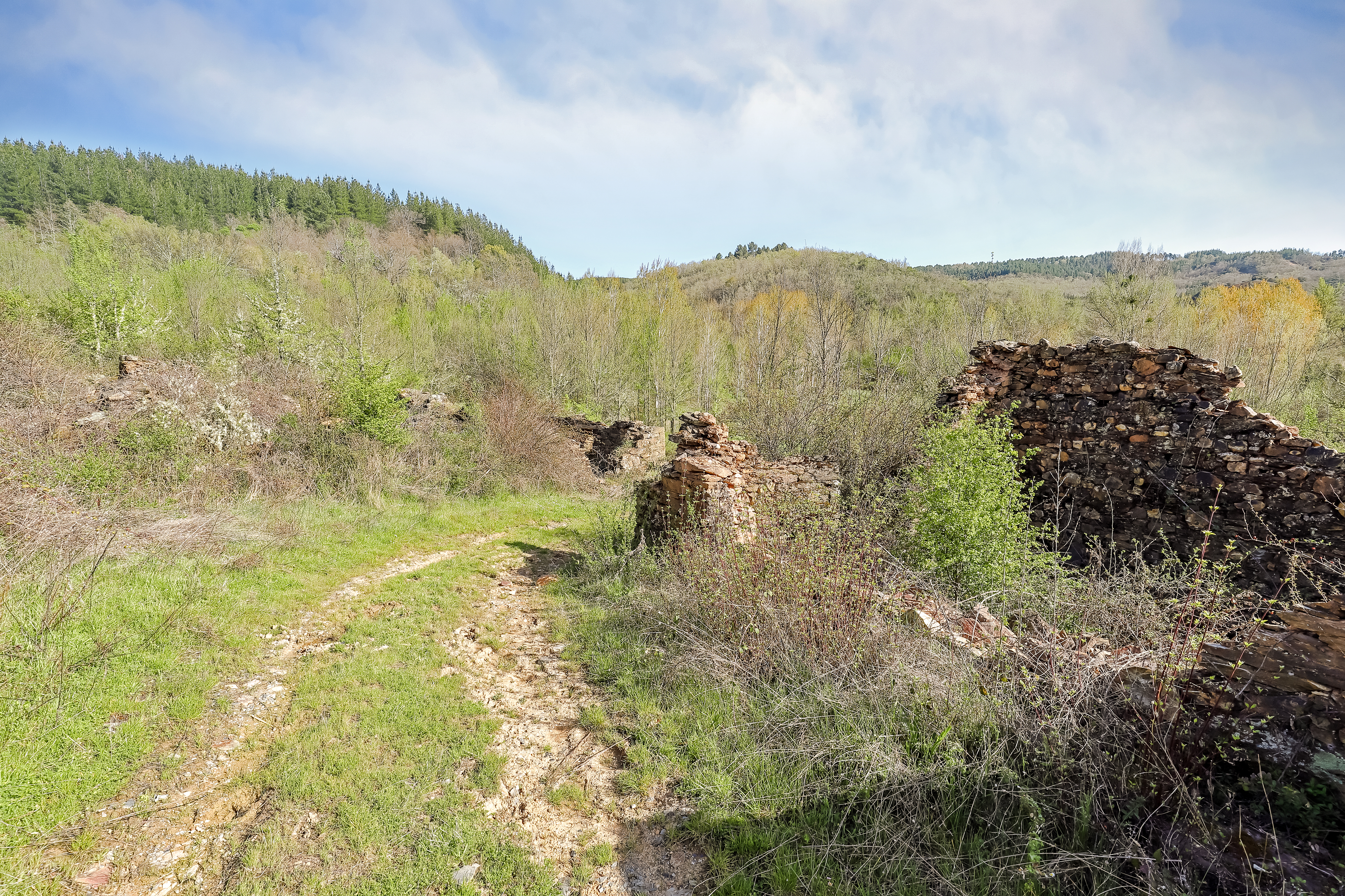 Castellanos es un despoblado que pertenece al municipio de Berlanga del Bierzo en la comarca de El Bierzo, provincia de León.